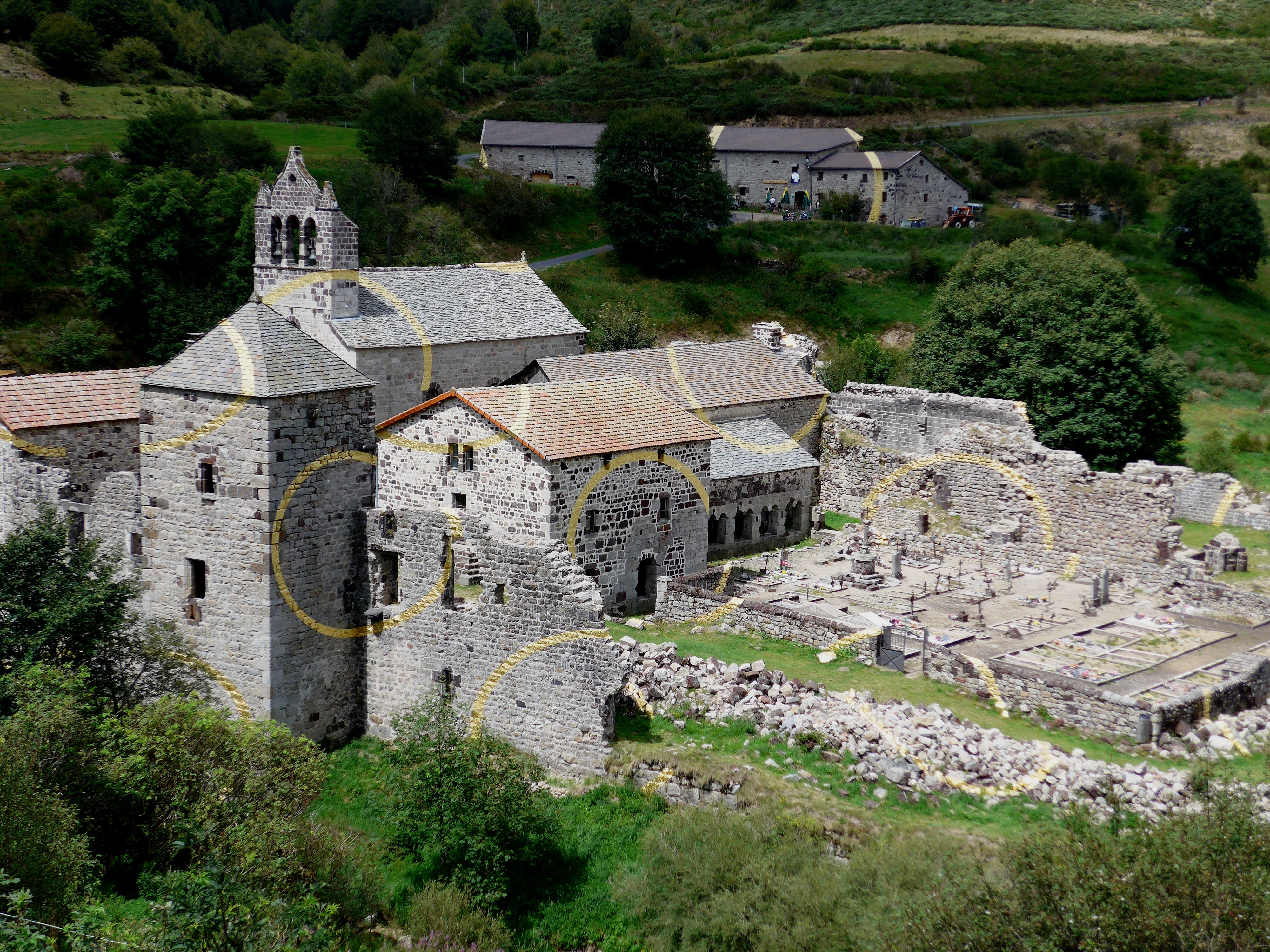 Abbaye de Mazan,abbaye cistercienne du12° siècle est en ruine.La nouvelle petite église fut construite au 19° siècle. .